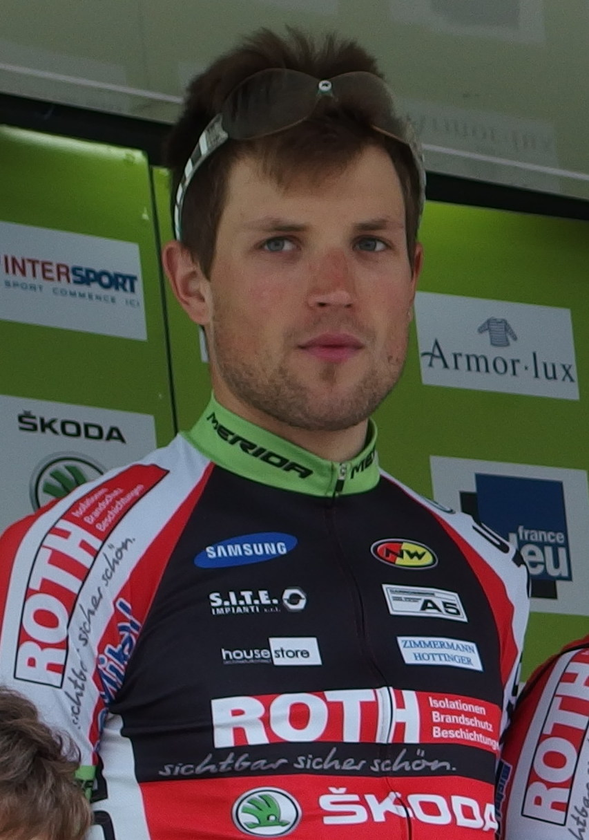 Tour de Bretagne 2015 - Présentation des équipes au départ de la troisième étape à Baud - Équipe Roth-Škoda Depicted person: Alberto Cecchin